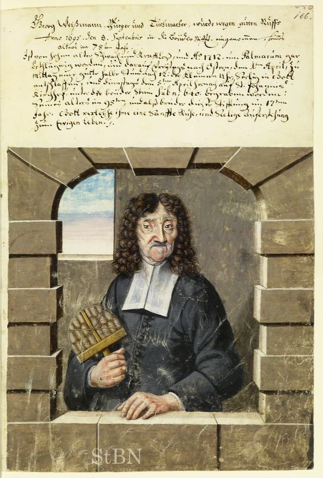 Transkription und weitere Informationen Georg Weißmann (Weißmann; Weismann), Tuchmacher (Tuchmacher; Tuchrauher; Weber)